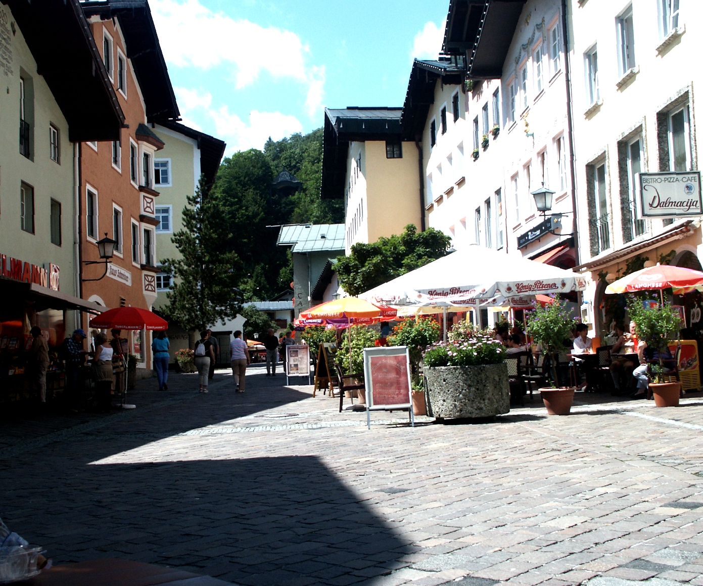 Berchtesgaden Innenstadt